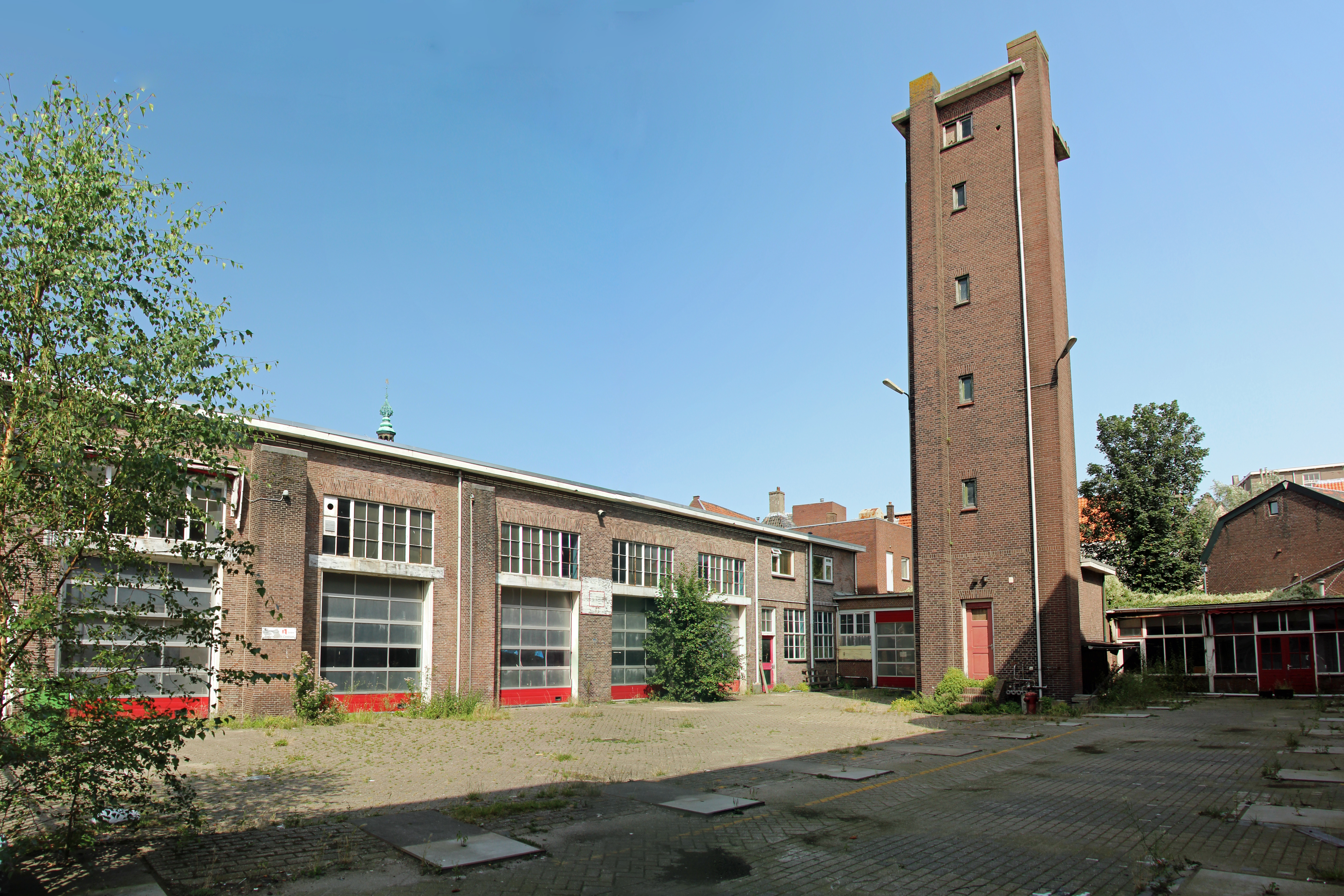 De eerste echte brandweerkazerne in Leiden kwam in 1936 tot stand aan de Langebrug 56 (bijzonder genoeg op de plek van de in 1933 afgebrande Petruskerk. De inmiddels verlaten voormalige brandweerkazerne zal worden gesloopt ten gunste van de bouw van studentenhuisvesting (21 wooneenheden met in totaal 76 studentenkamers). De nog bestaande (overgebleven) gevel van de Petruskerk aan de Langebrug zal behouden blijven en zal gaan dienen als entree van het nieuwe gebouw. Ook de slangentoren zal behouden blijven.